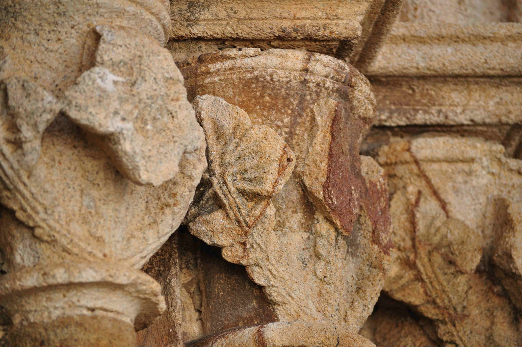 Detalle iglesia de la Veracruz en Santa Cruz de la Sierra